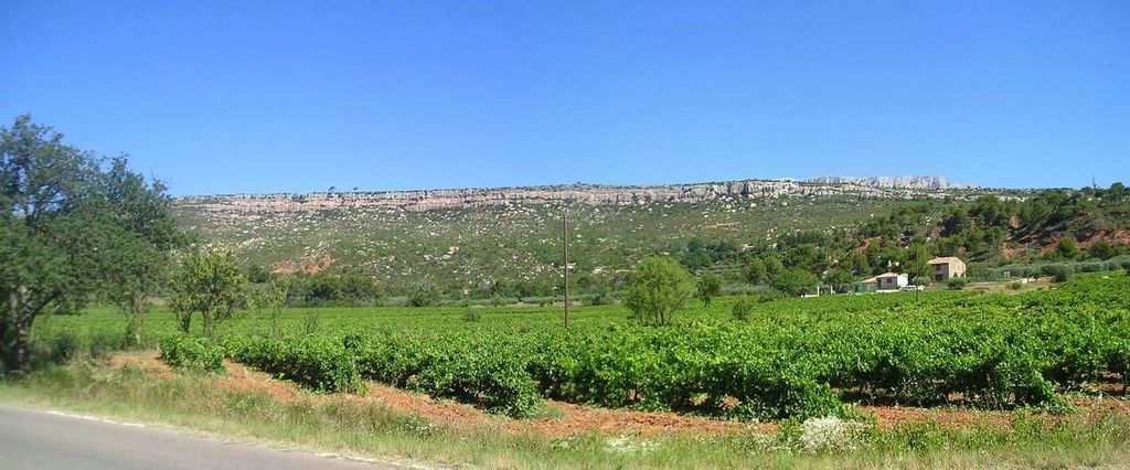 le plateau du Cengle, vu depuis la vallée de l' Arc, et en arrière plan, les crêtes de la montagne de la Ste Victoire qui lui est accolée.